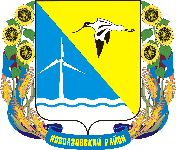 Герб Новоазовского района Донецкой области